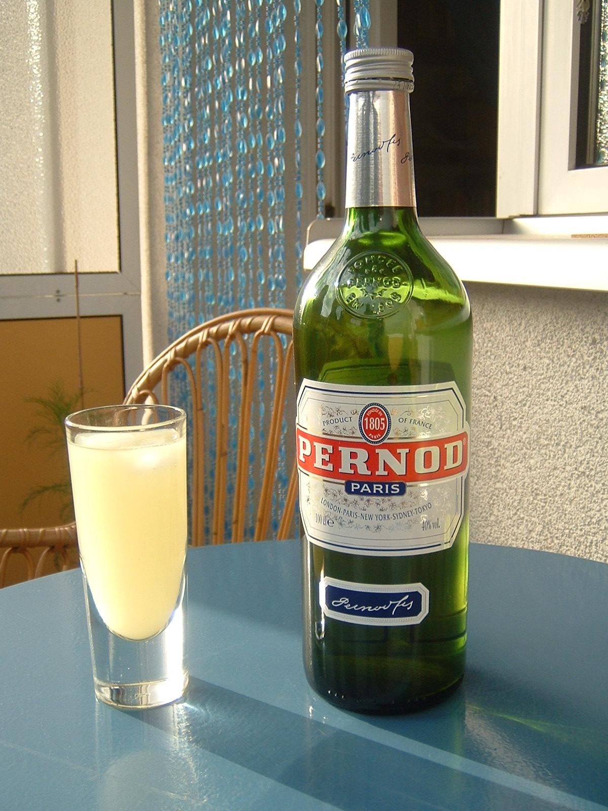 1 l Pernodflasche mit Glas mit Eis